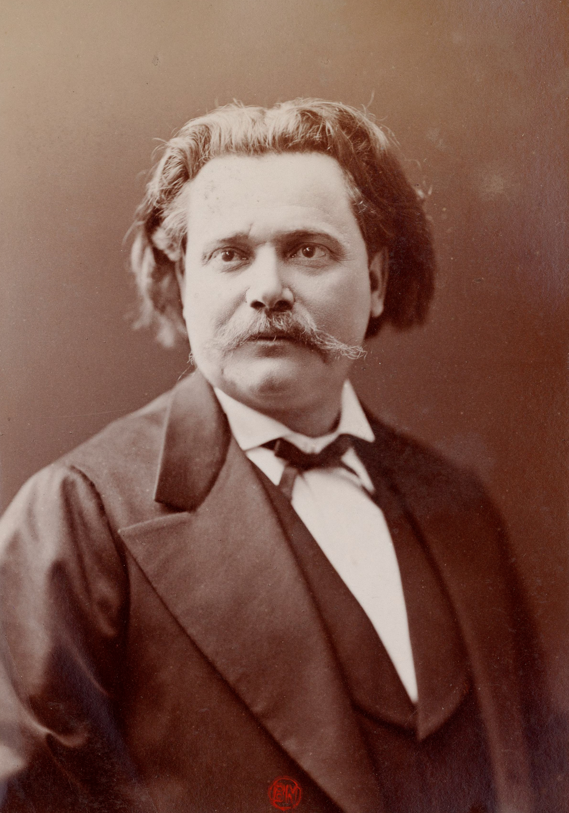 Germain Casse.